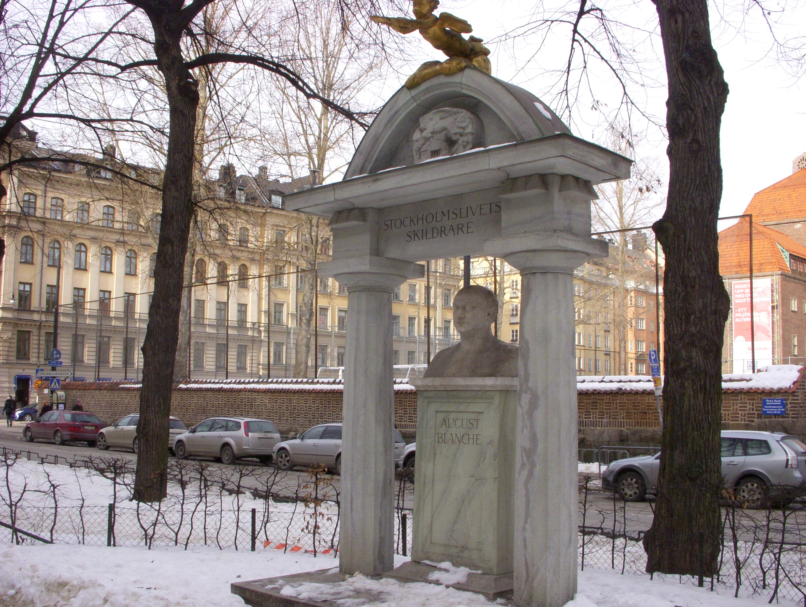 Äreminnet över August Blanche vid Karlavägen, Stockholm, av Aron Sandberg rest 1918